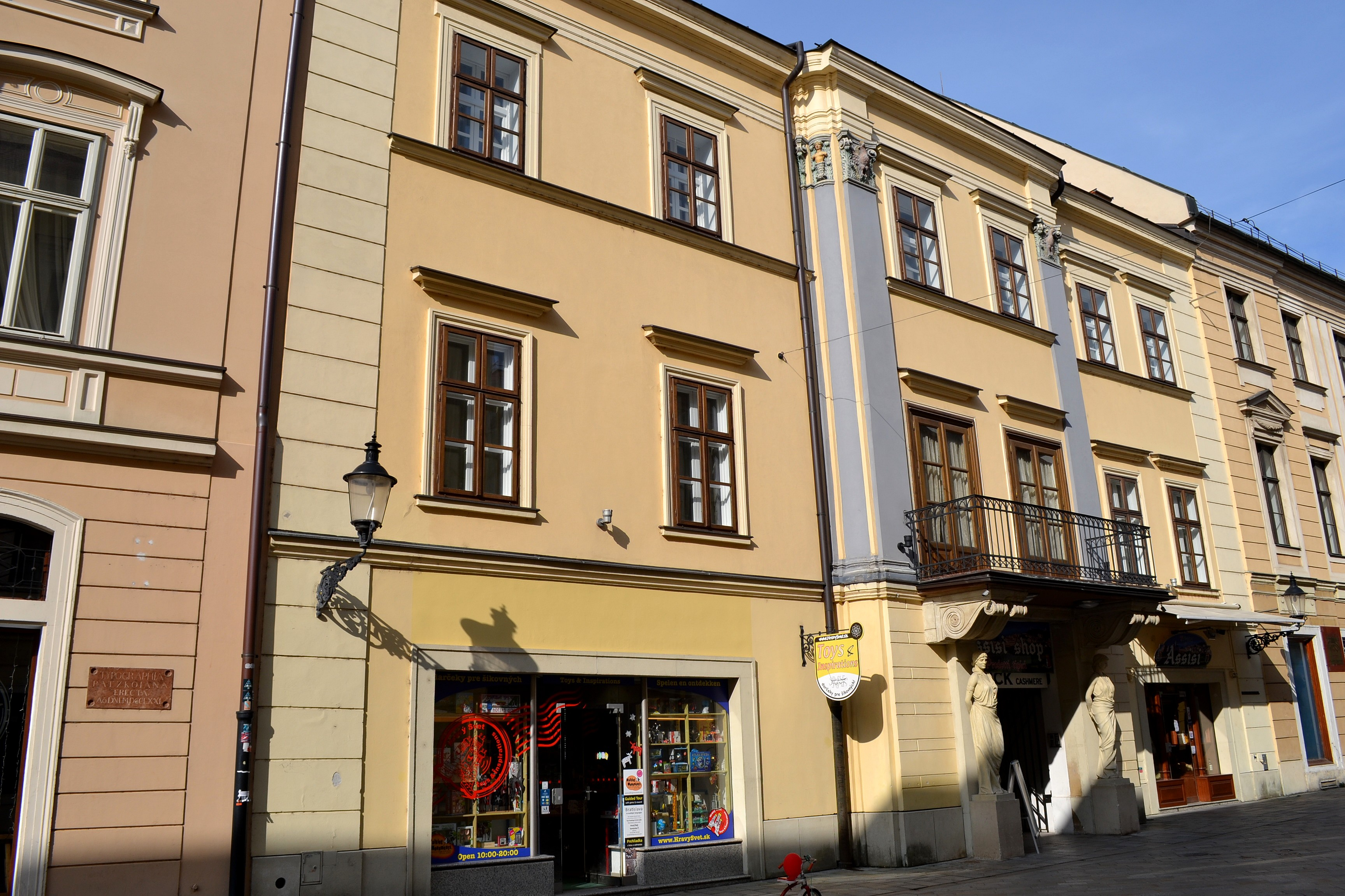 Ventúrska ul. č. 7. Celkový pohľad